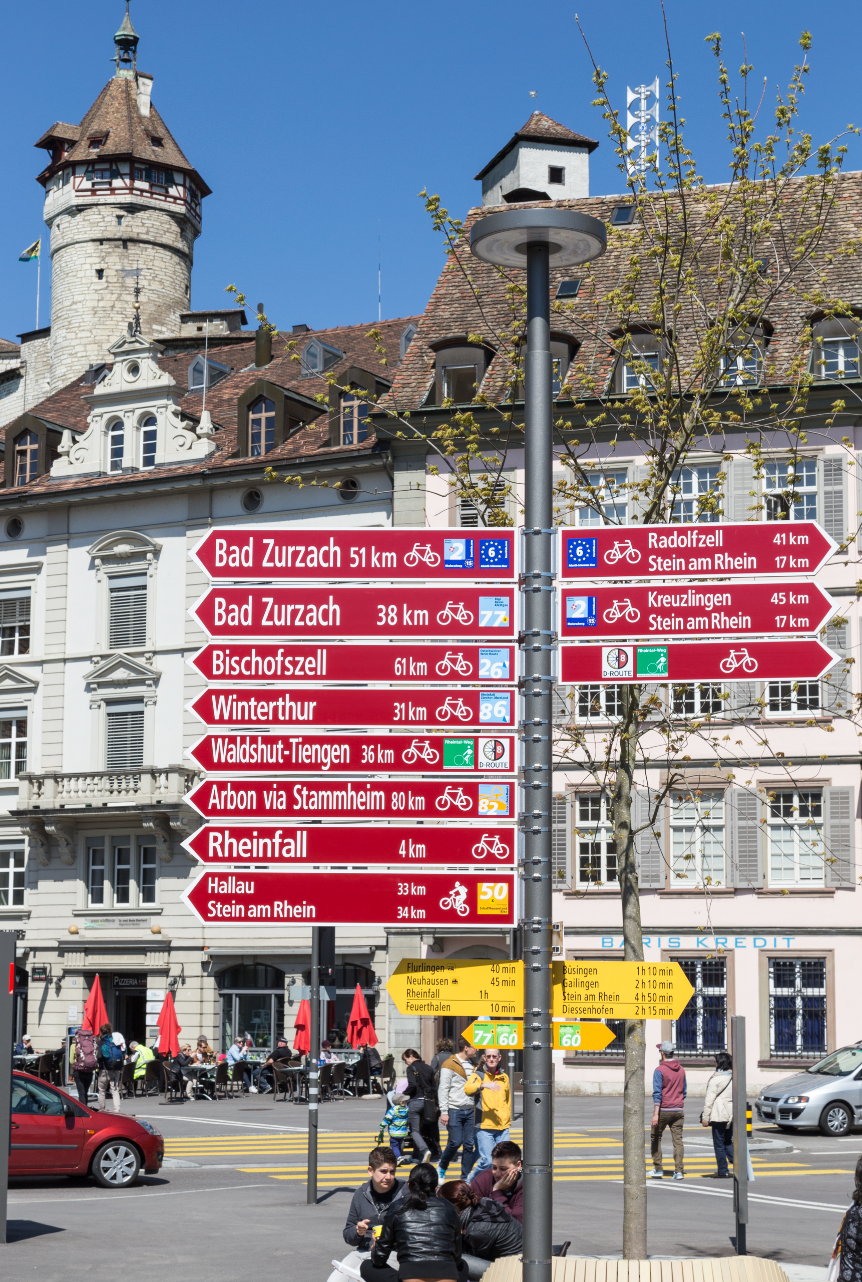 (Velo- und Wander-)Wegweiser in Schaffhausen